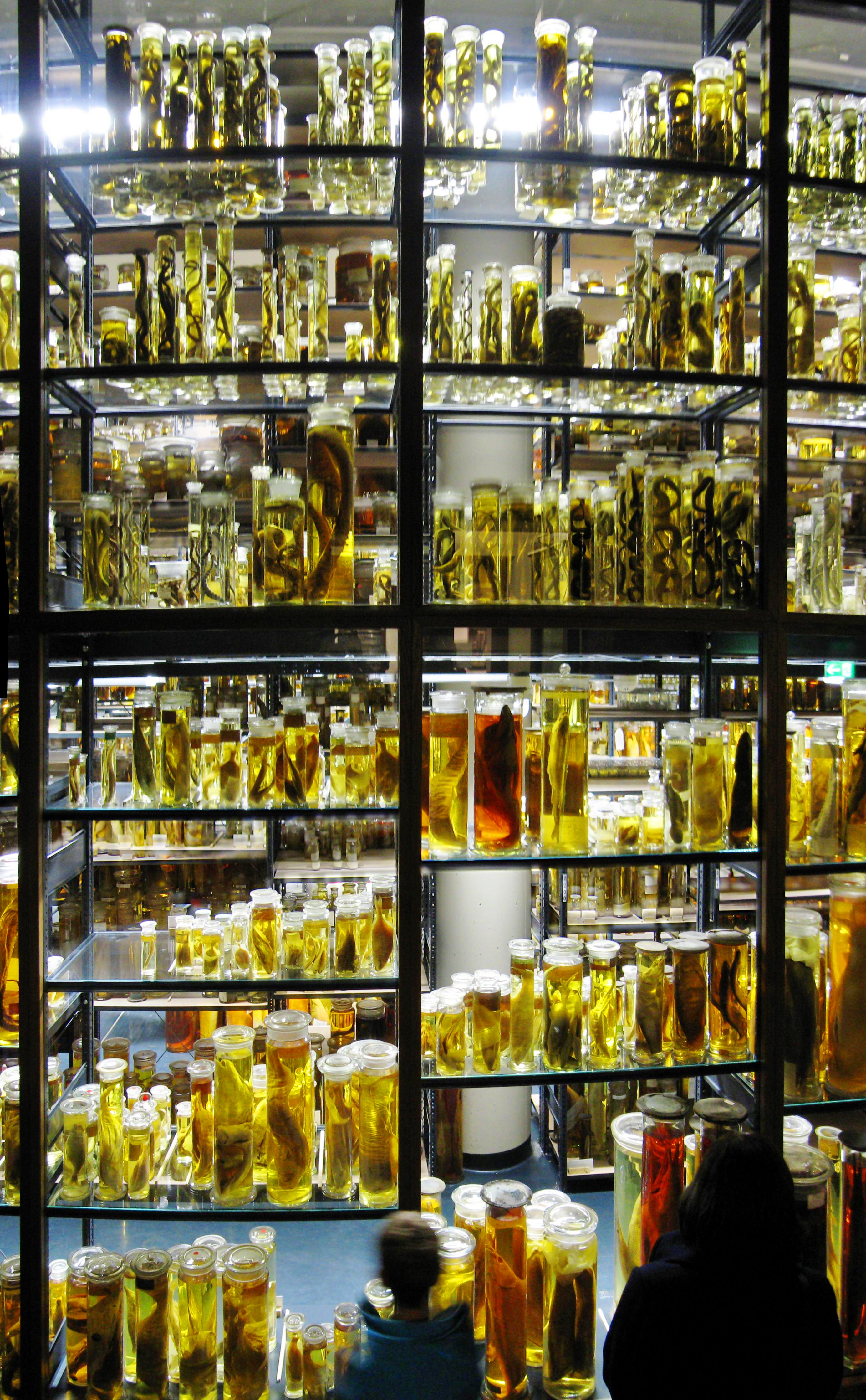 Formalinorgie